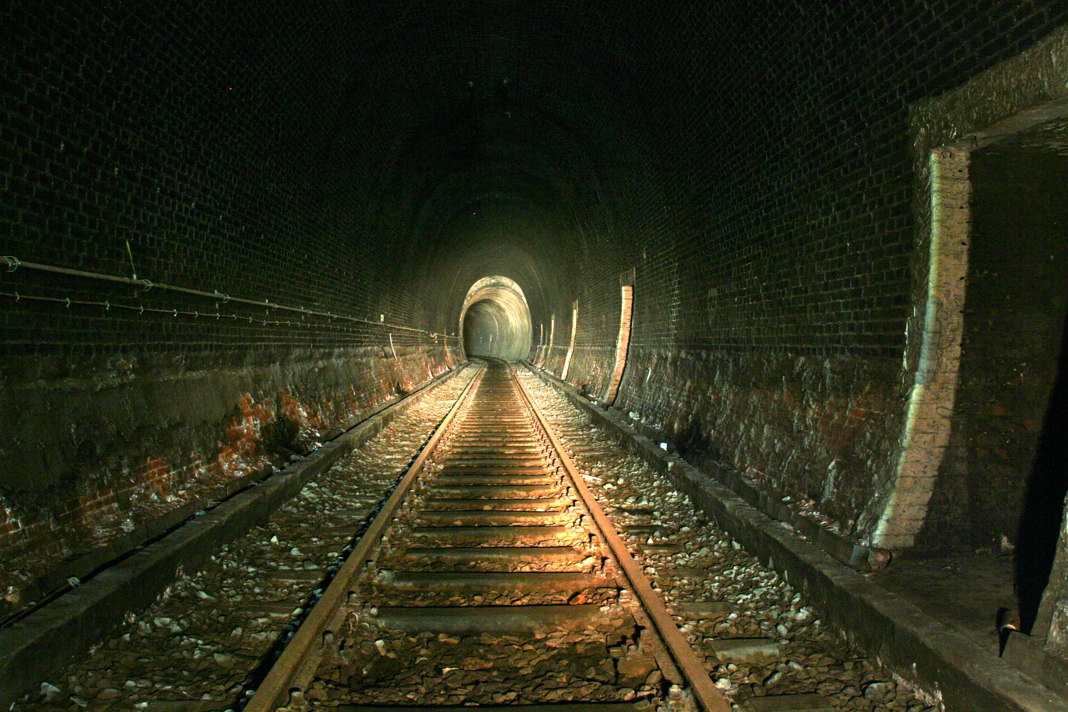 Schellfischtunnel